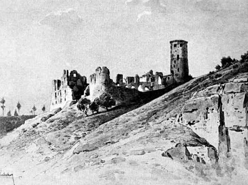 Česky: Zvířetice od východu